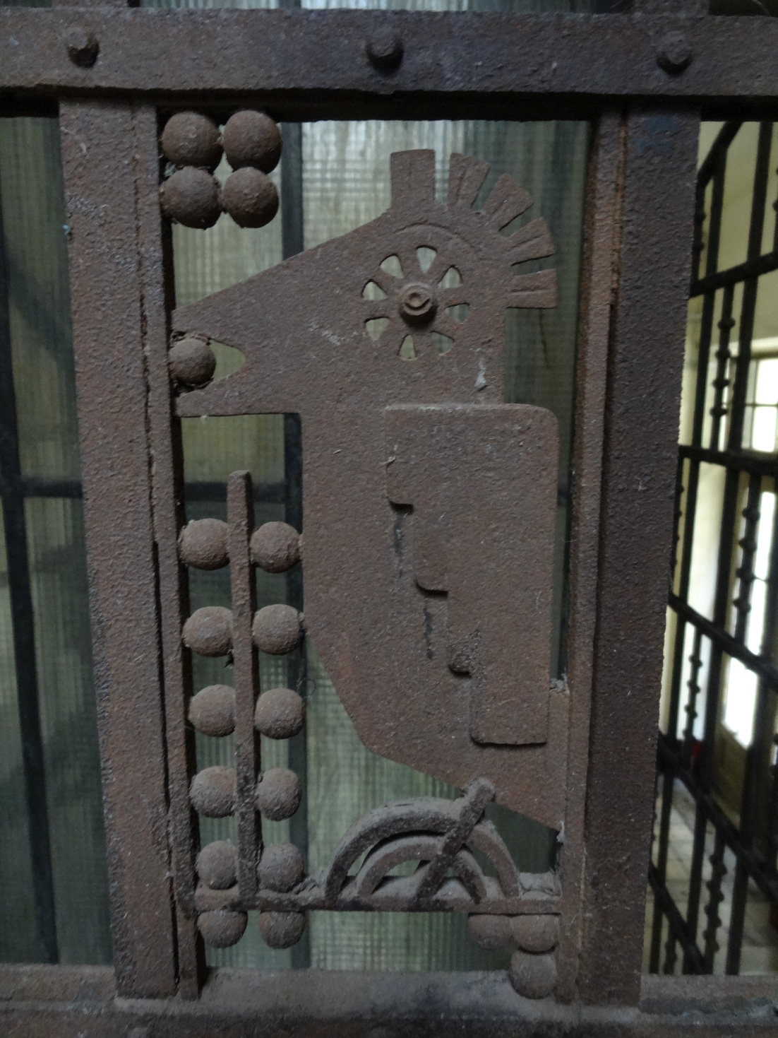 Budapest, Népszínház utca 37. – Kovácsoltvas holló 2017